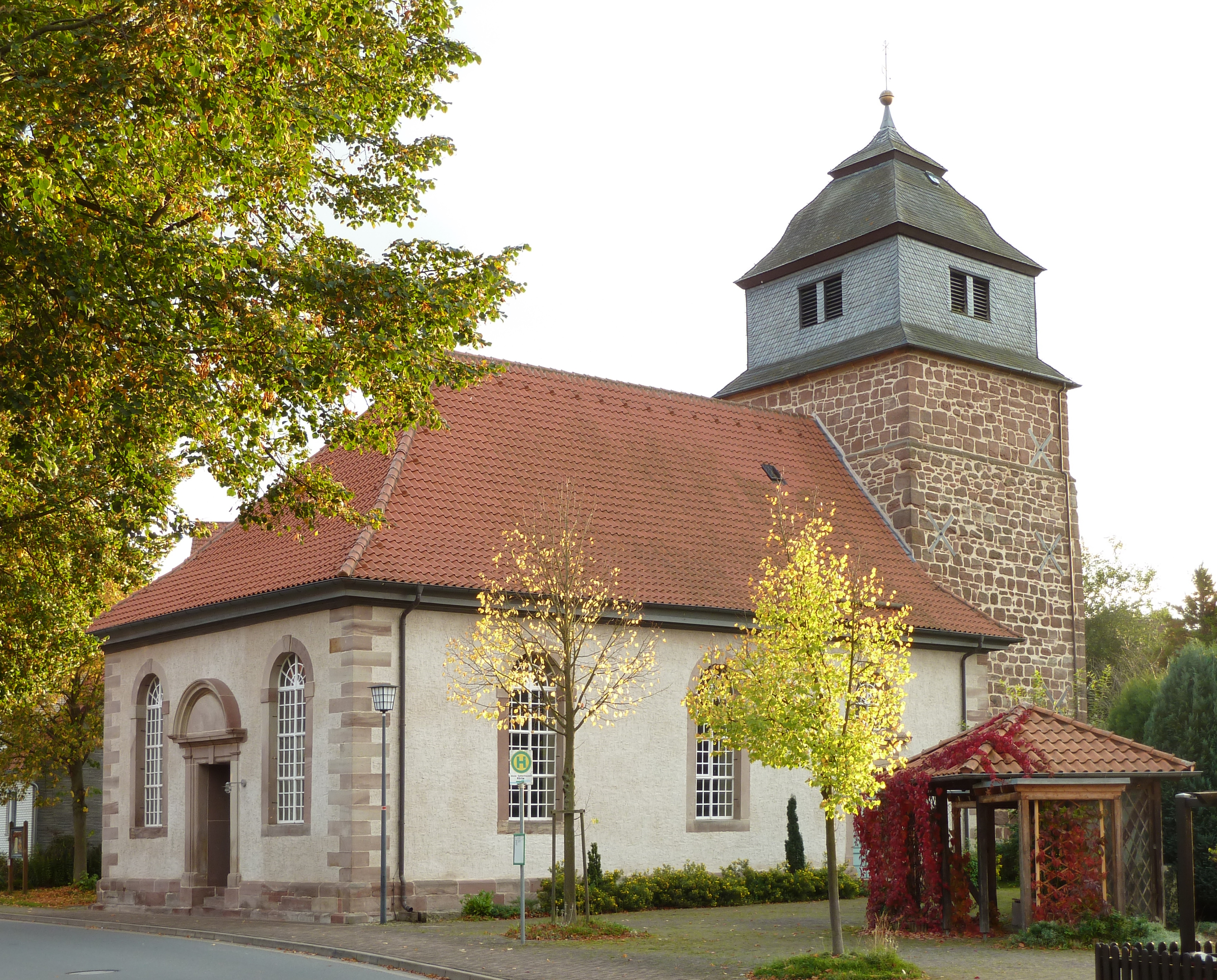 Evangelisch-lutherische Kirche in Wöllmarshausen, Gemeinde Gleichen, Niedersachsen; Ansicht von Nordosten. Turm mittelalterlich, Saal 1756 erbaut, verschieferter Fachwerk-Turmaufsatz Anfang 19. Jahrhundert